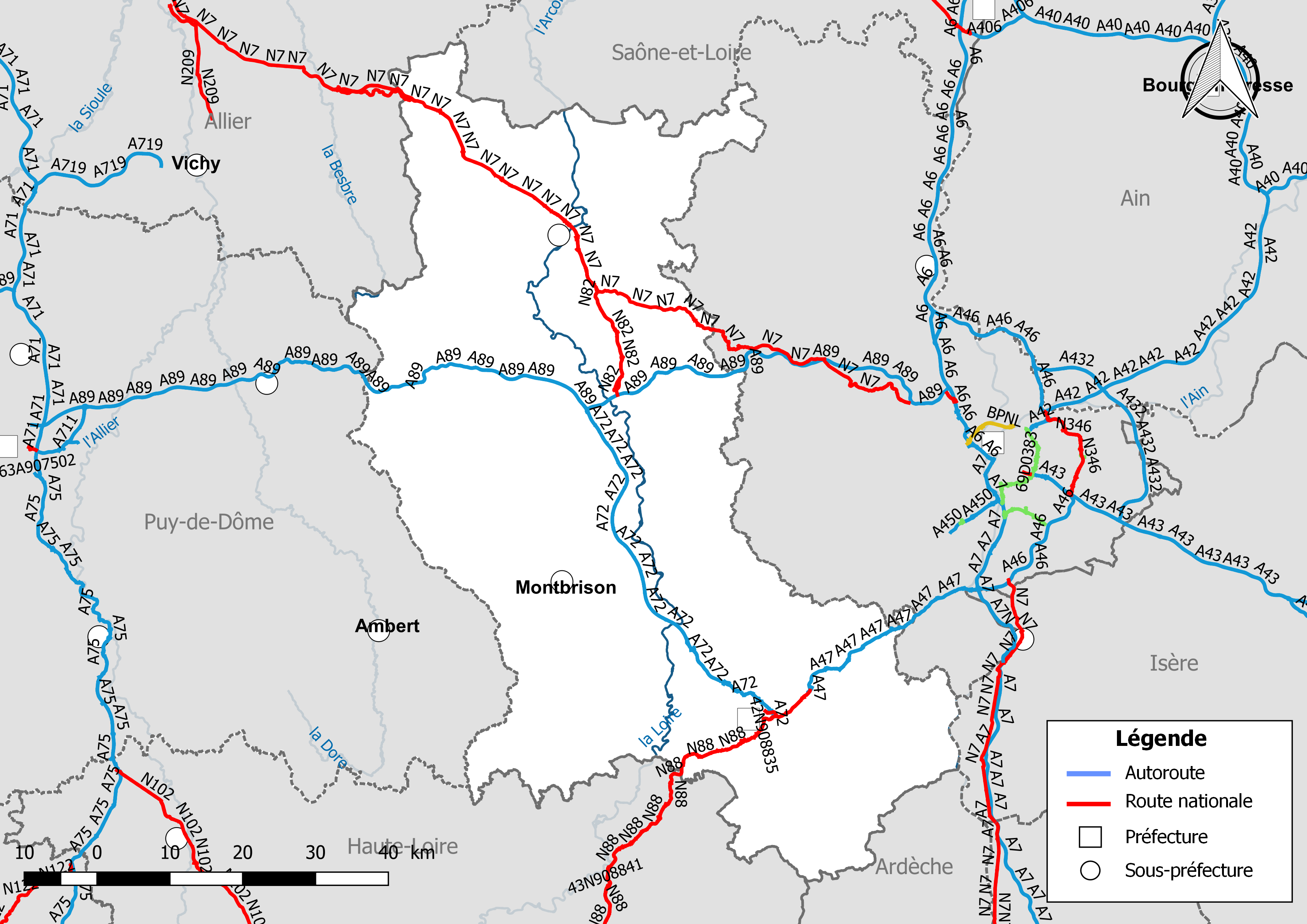 Carte du réseau routier national, constitué des autoroutes et des routes nationales, dans le département de la Loire (France). Situation au 1er janvier 2019.